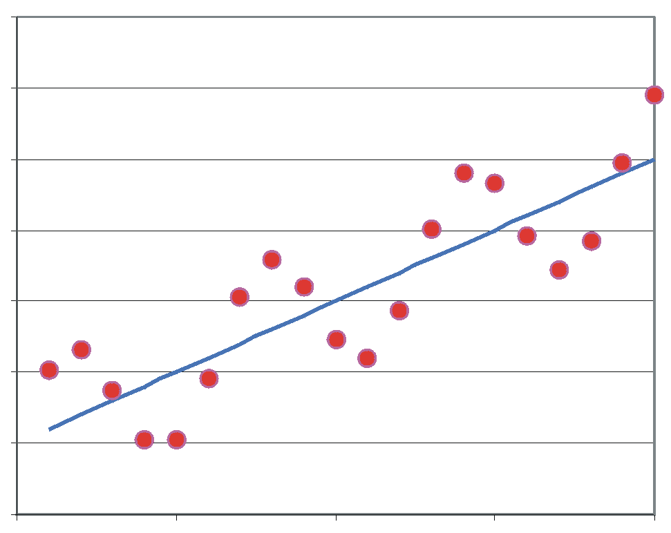 Korrelierte Residuen (least squares)